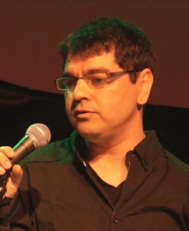 יאיר בן-חור